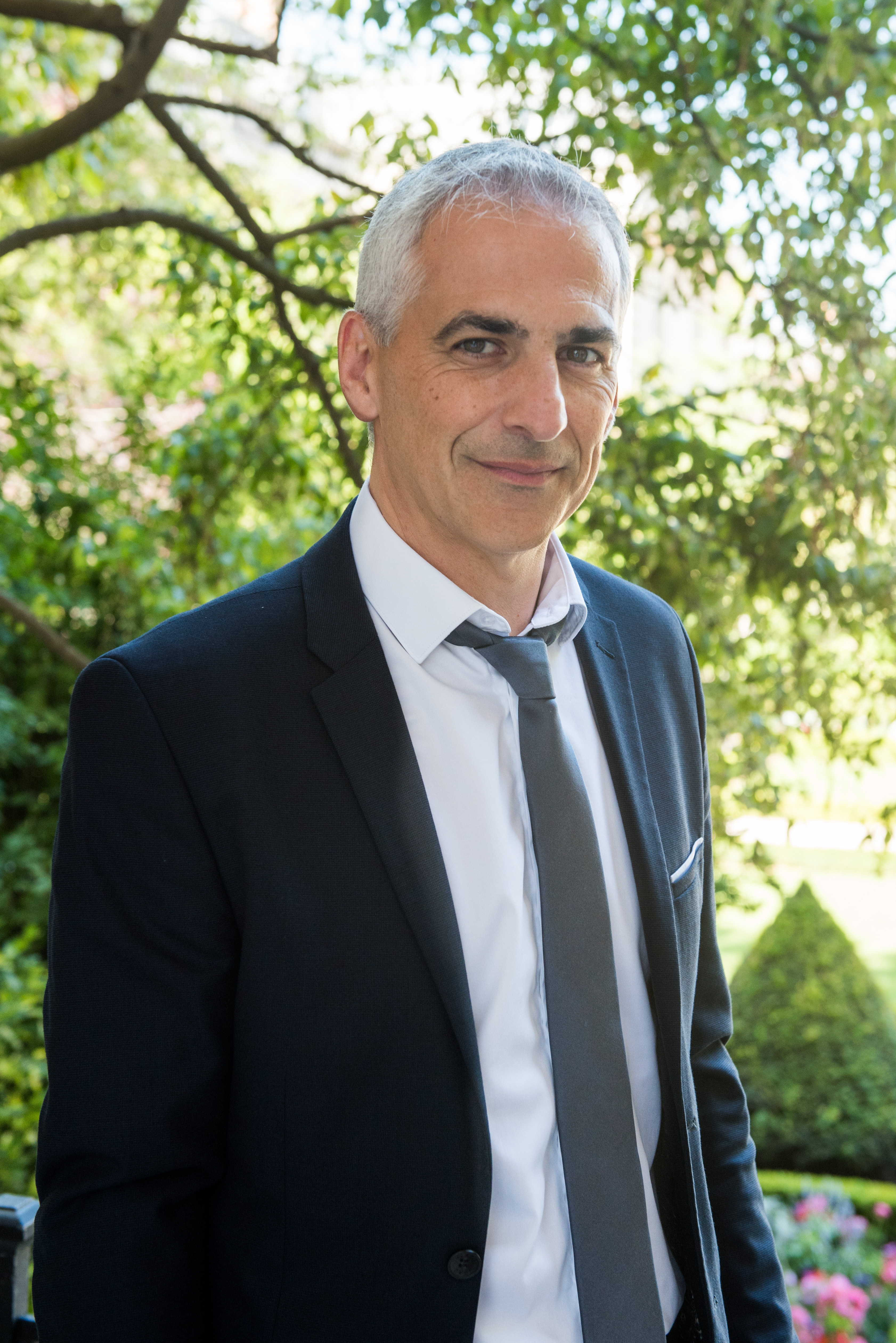 Jean-Luc Fugit dans le jardin des Quatre colonnes du palais Bourbon en 2017.